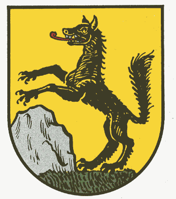 Wappen von Rothselberg